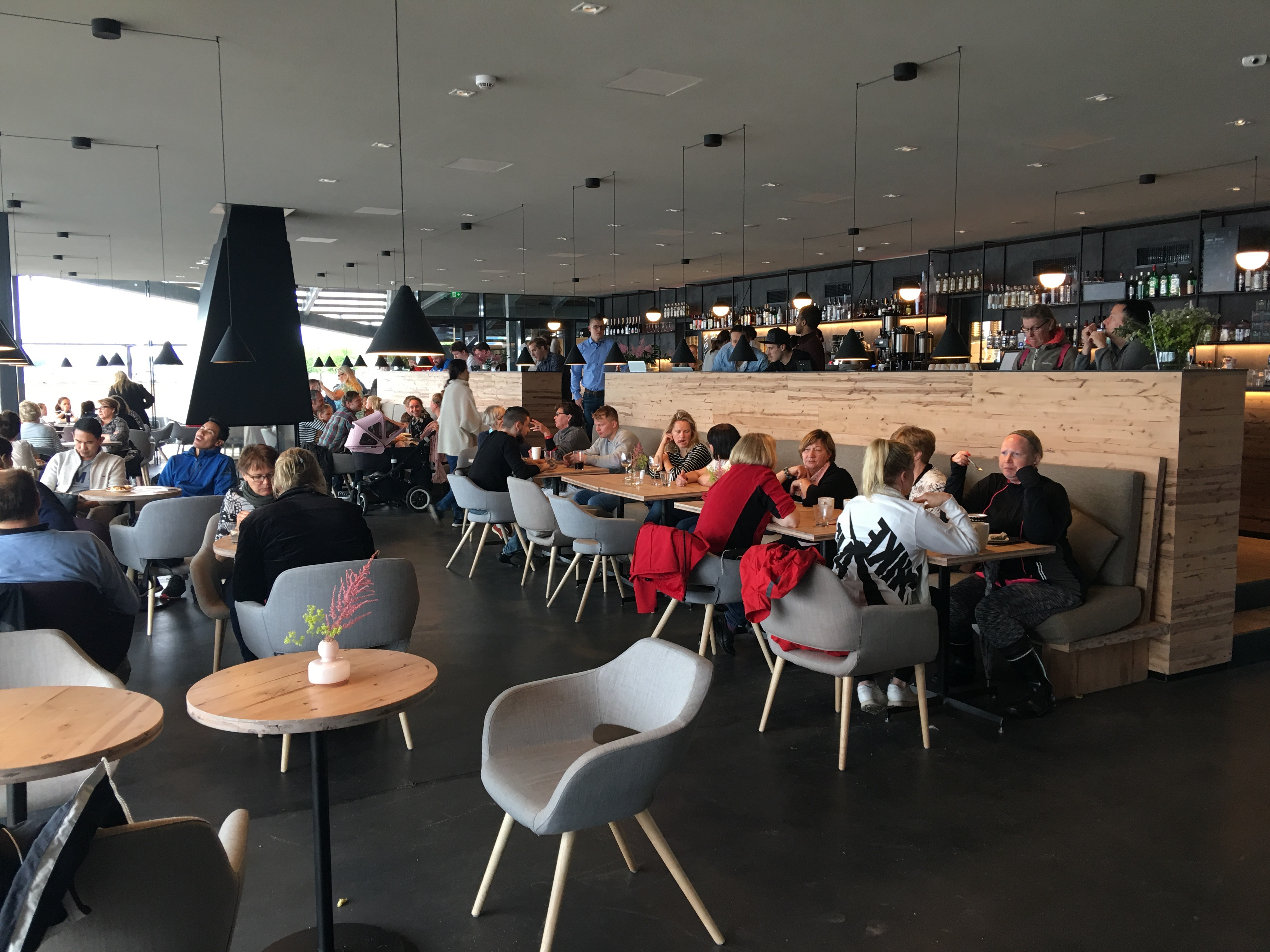 Helsingin Hernesaaressa sijaitsevan Löyly -saunakompleksin ravintola.